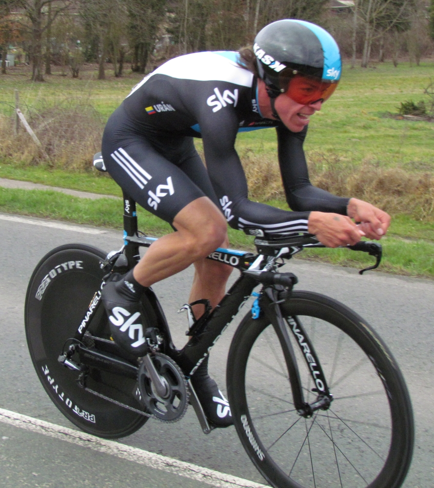 Uran paris nice 2012